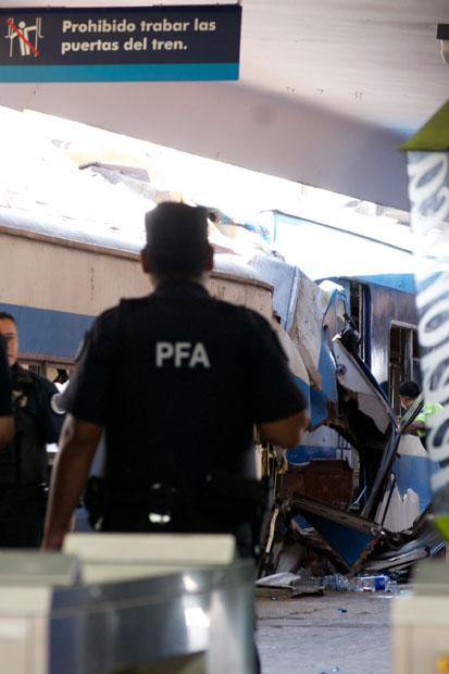 Formación del Ferrocarril Sarmiento accidentado en la estación de Once (Buenos Aires). La tragedia dejó un saldo de 49 muertos y más de 600 heridos.